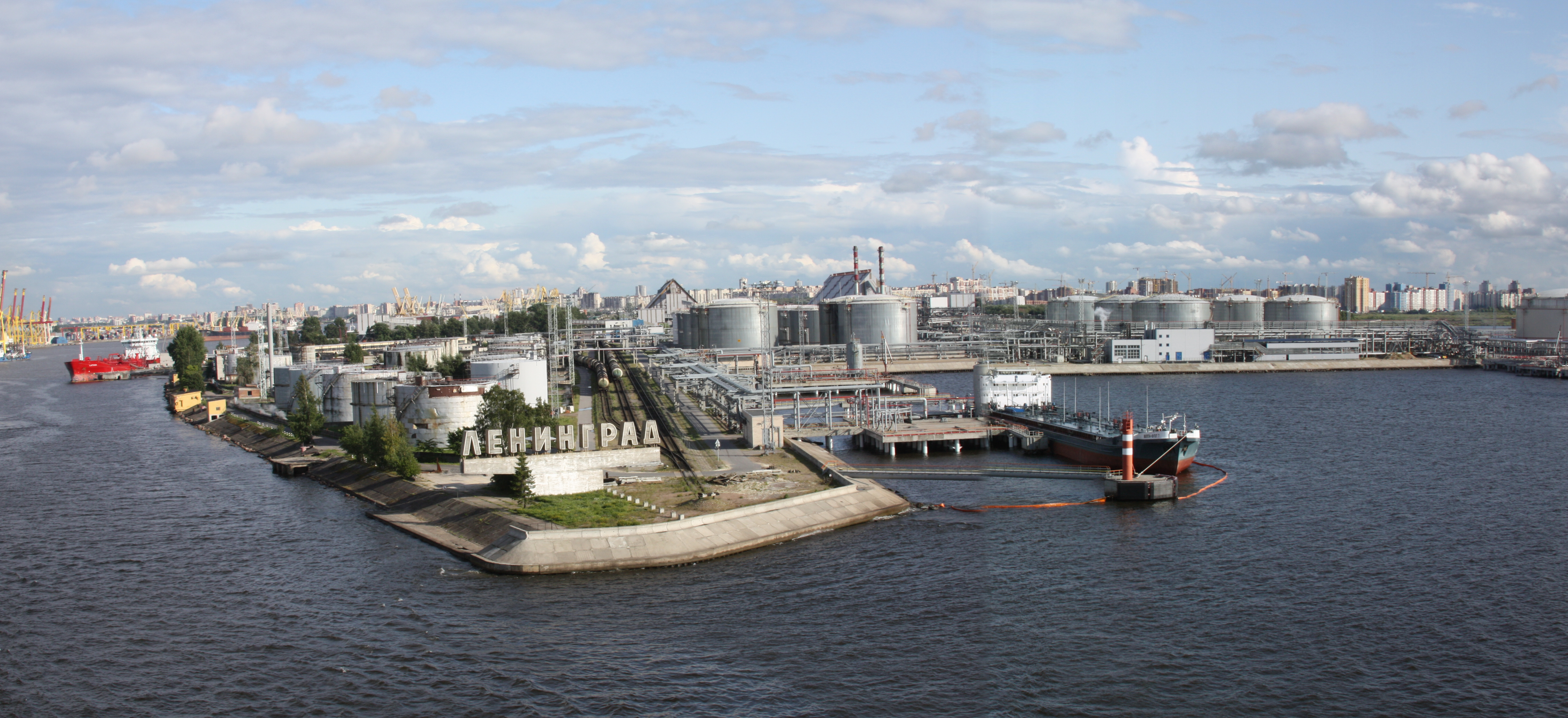 Port of Sain Petersburg Russia 2009